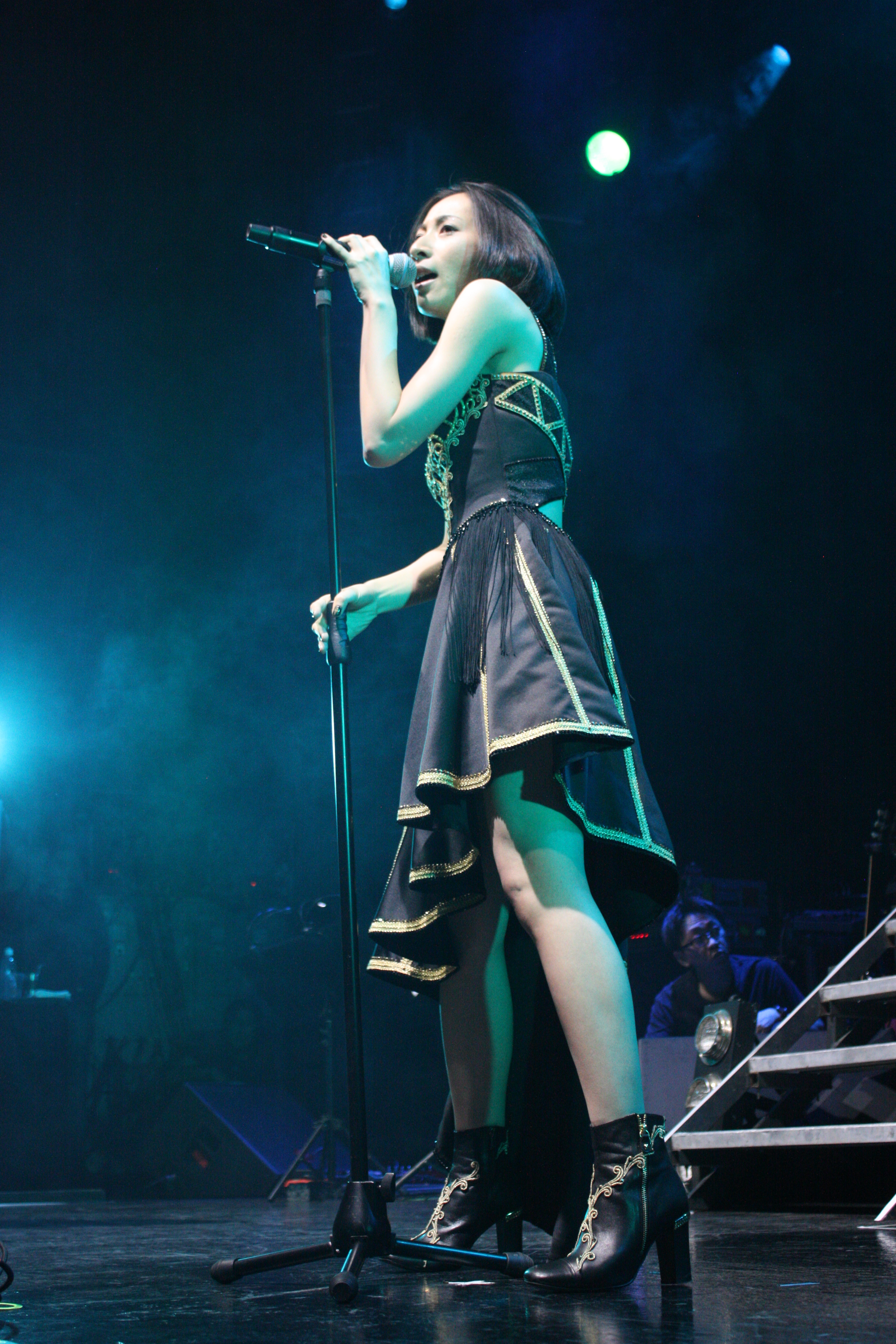 El grupo japonés Kalafina integrado por Hikaru, Keiko y Wakana, presentándose en el Plaza Condesa de la Ciudad de México el pasado 20 de Febrero.